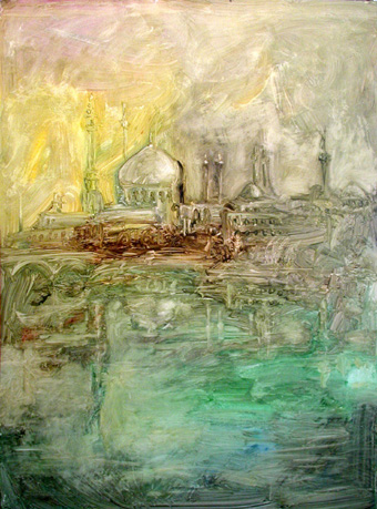 Mausoleo de Fátima al-Masuma. Serie "Al Islam" del artista Pedro Roque Hidalgo